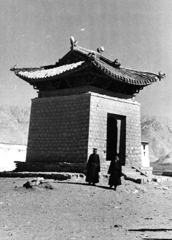 Lhasa, chinesisches Wachhaus vor dem Potala